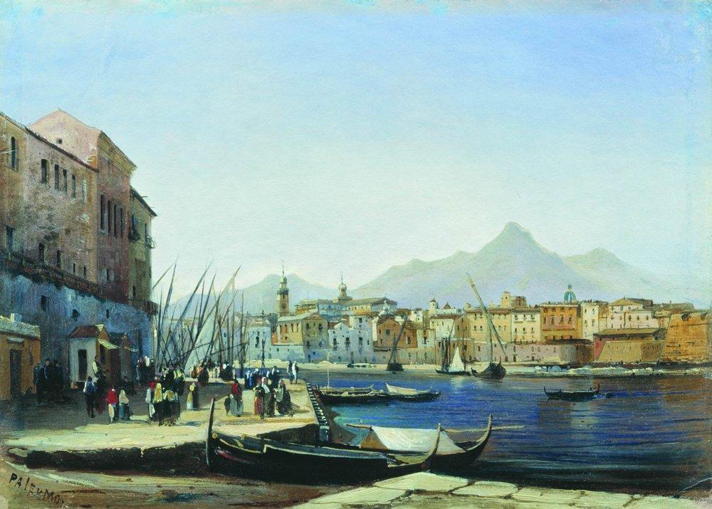 Palermo